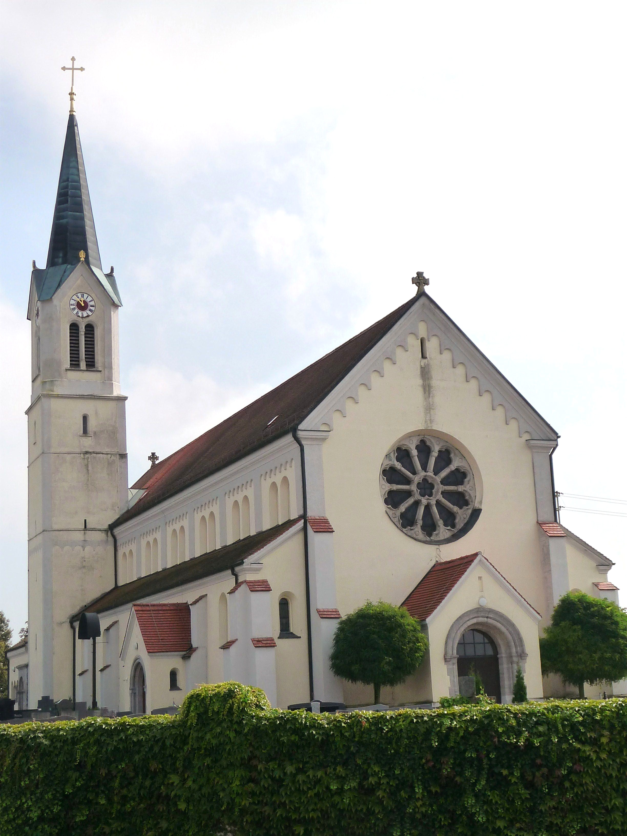 Die Pfarrkirche St.Laurentius in Otzing